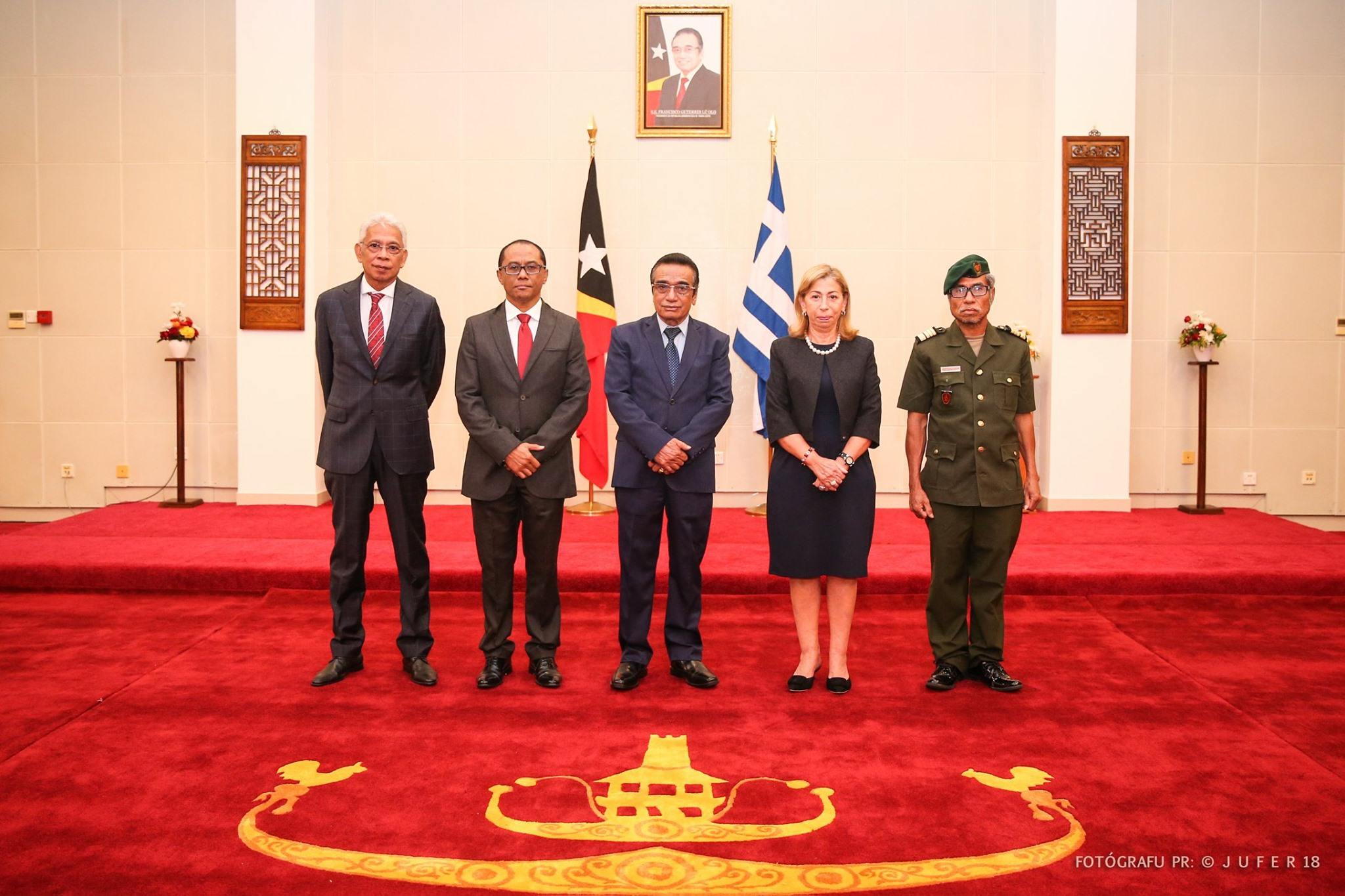 Konstantina Koliou übergibt ihre Akkreditierung als Botschafterin Griechenlands an Osttimors Staatspräsident Francisco Guterres.